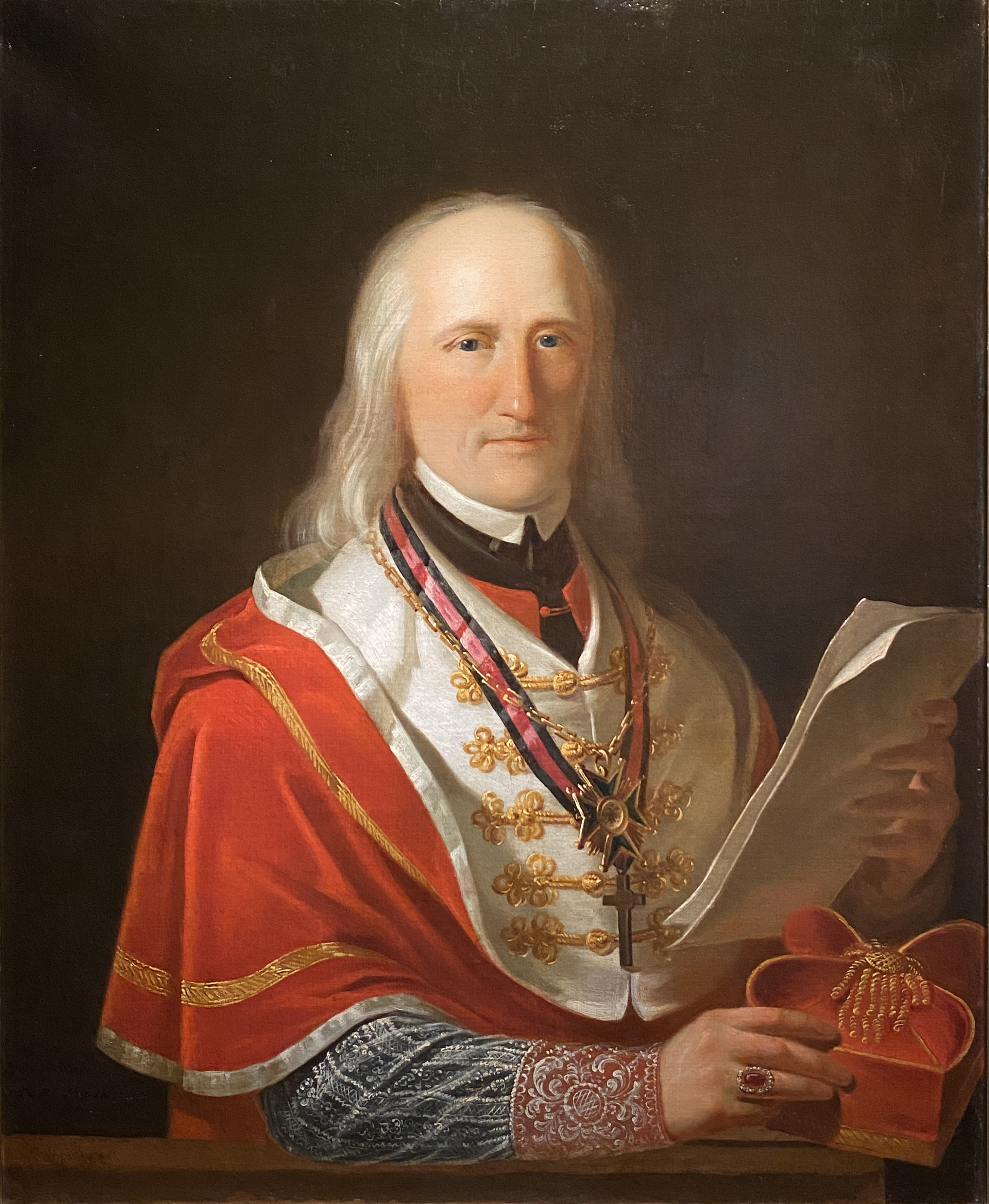 Stanislovas Bogušas Sestšencevičius painted by Jonas Damelis